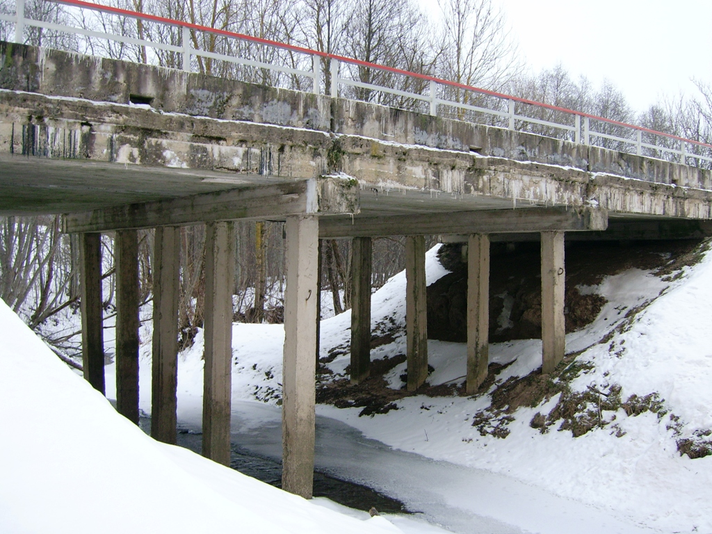 Jatkantalių tiltas – gelžbetoninis rajoninio kelio 4513 tiltas per Irtuoną Jatkantalių kaimo apylinkėse.